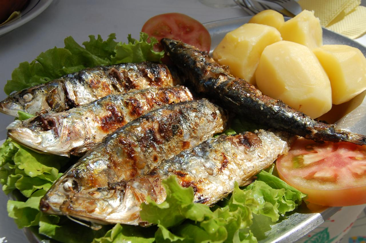 Grilled Sardines 5.50€ / Marisqueira O Varino Nazaré